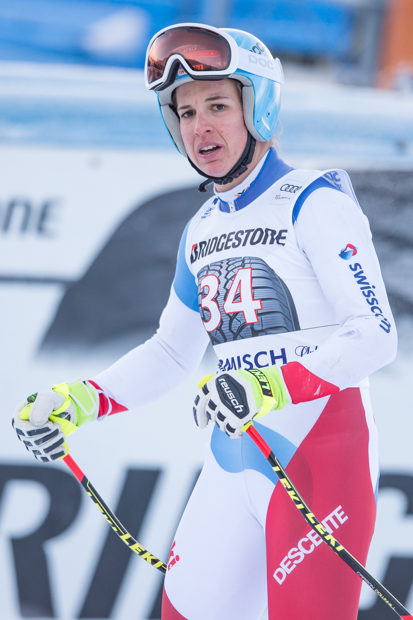 64. Kandahar Rennen,Audi FIS Ski Weltcup Garmisch-Partenkirchen,Damen Abfahrt,Jasmine Flury,Kandahar,Ladies Downhill